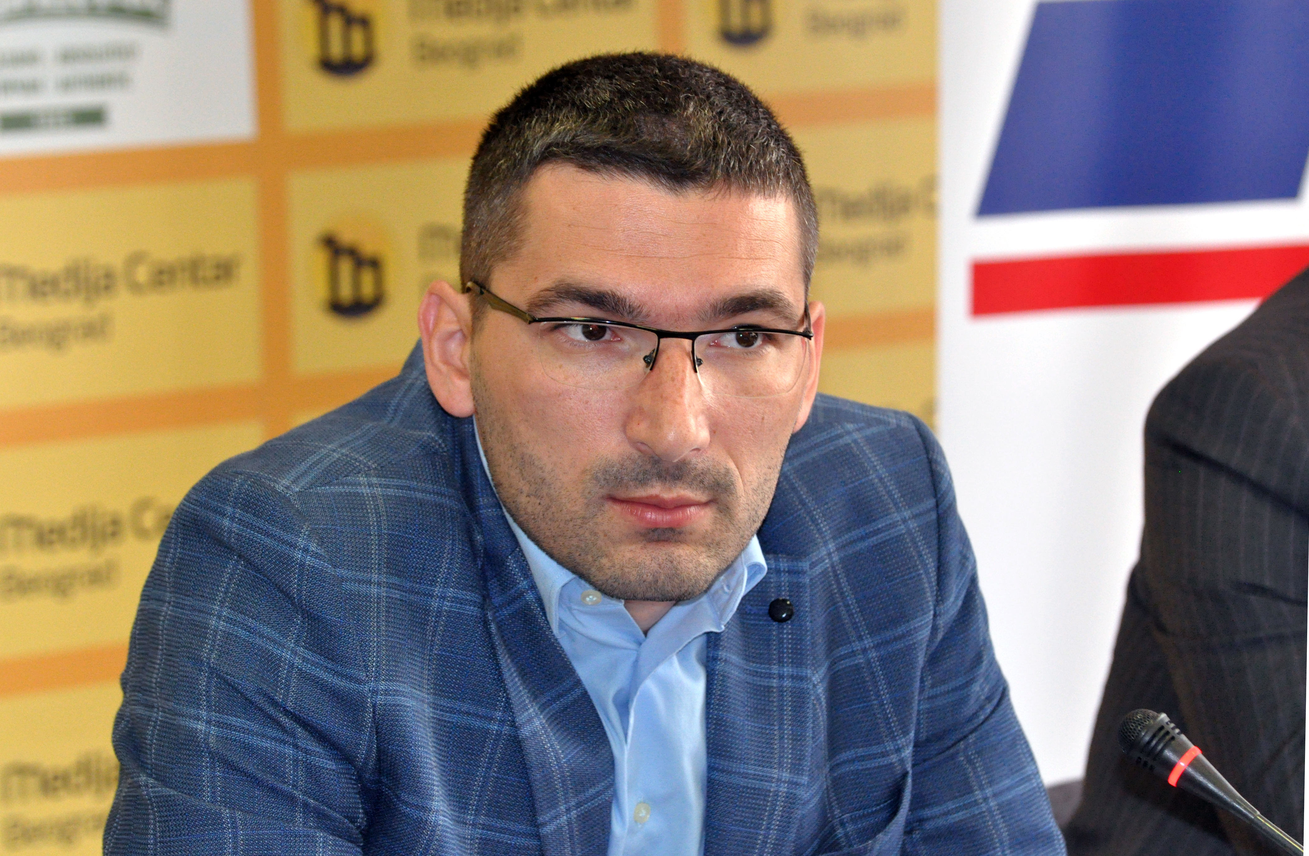 Мирослав Паровић спрски политичар